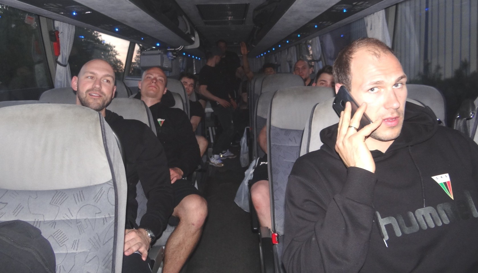 GKS Tychy - podróż do Tych, 545km (29.04.2018)